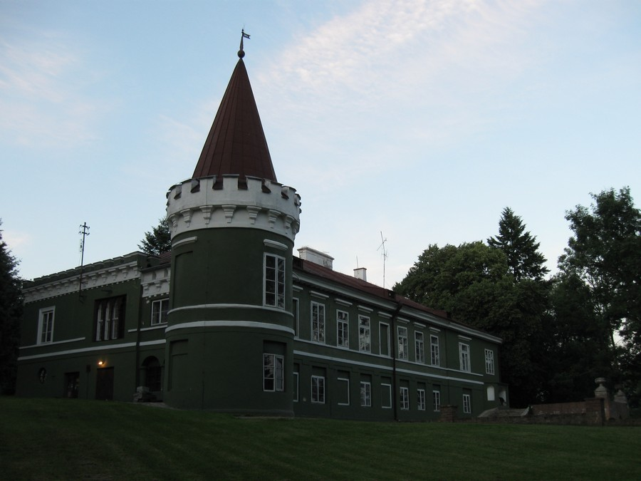 Pałac w Tarnogórze